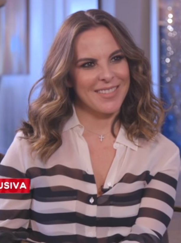 Kate del Castillo platicó en exclusiva con Pati Chapoy en su casa de Los Angeles.